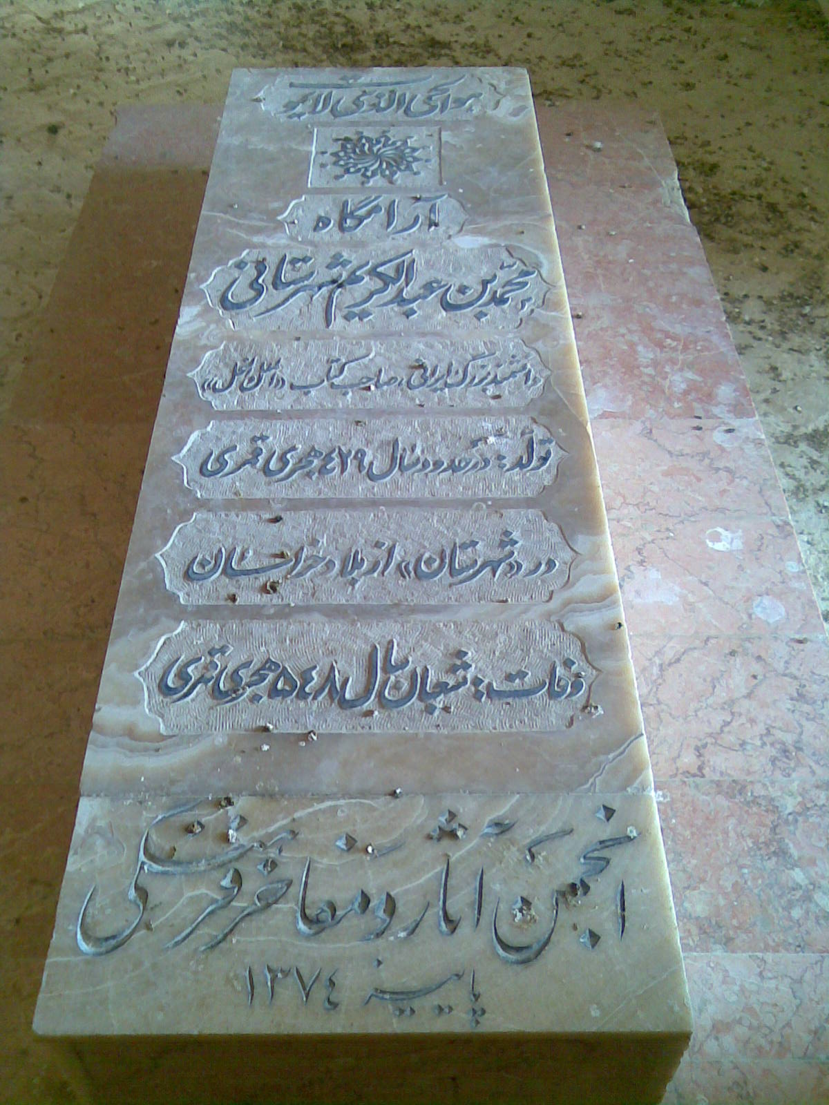 نمای مقبره علامه شهرستانی